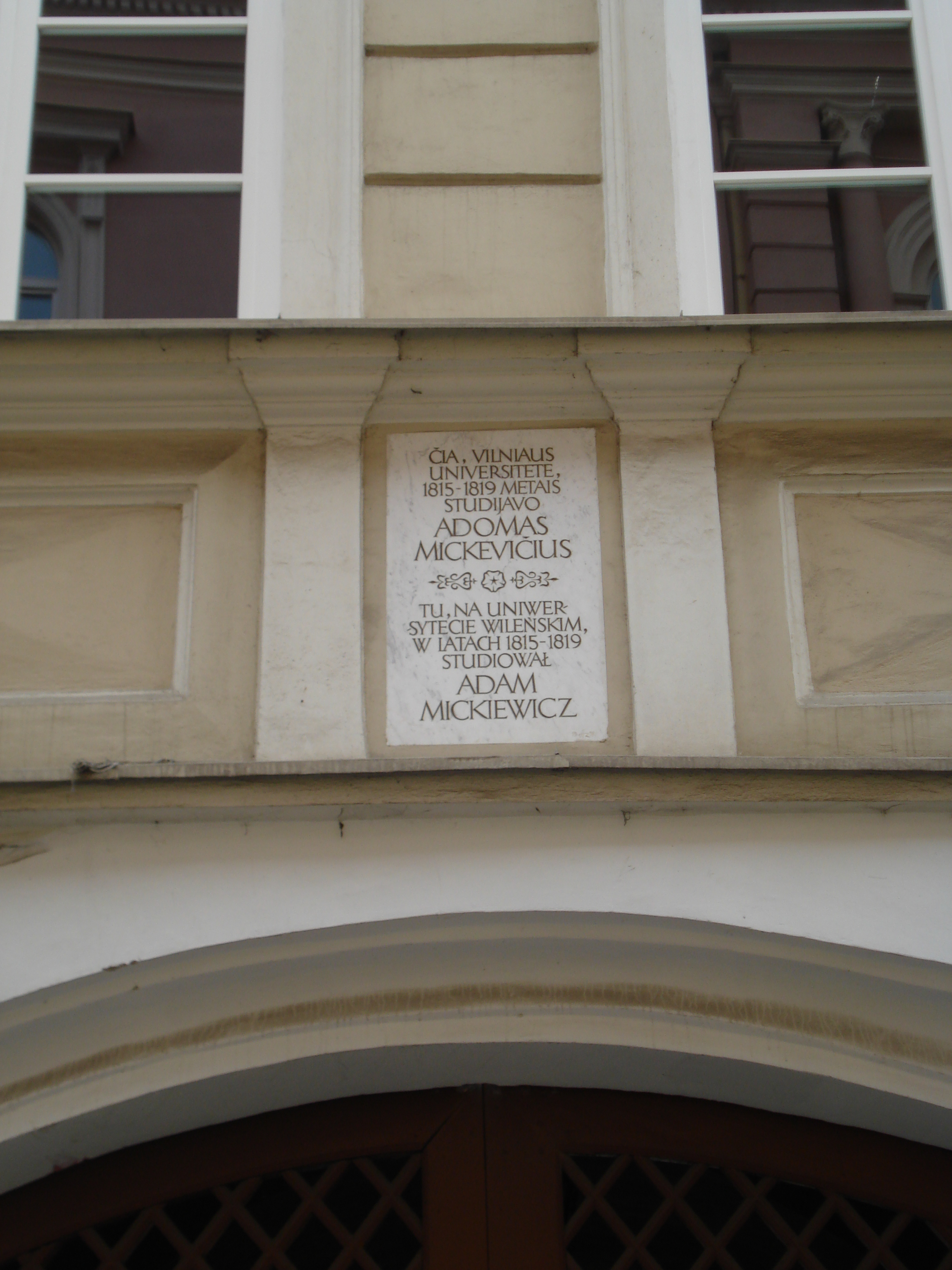 Memorial board in Vilnius (Pilies g.). Tu studjowal Adam Mickiewicz 1815-1819